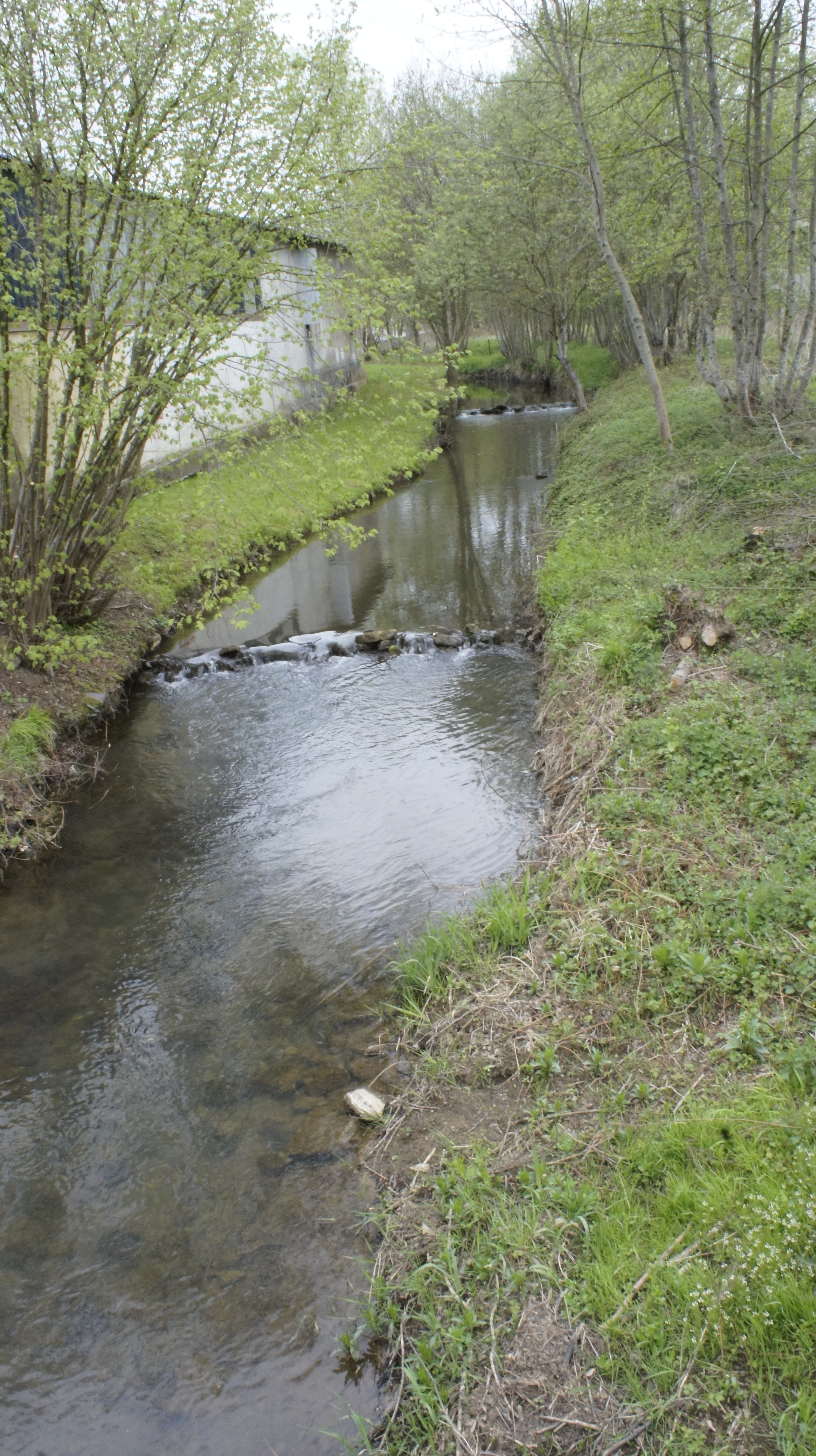 Rivière traversant Tournes, peut-être l'Audry ?